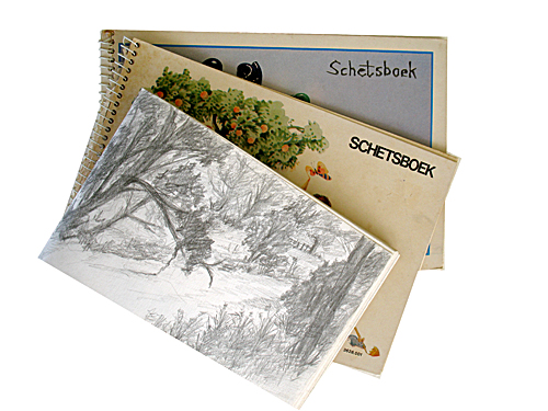 Schetboek